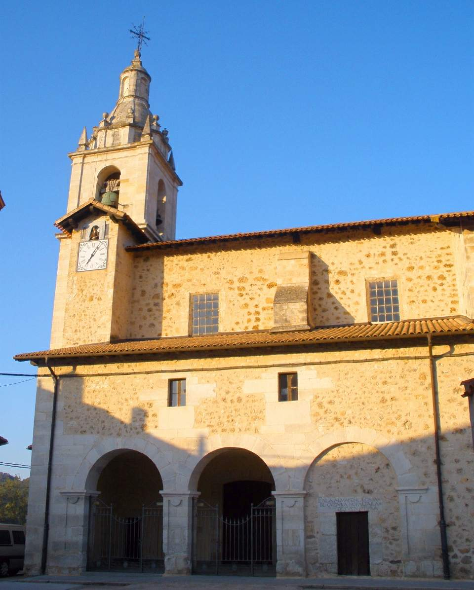 Maestu (Álava) - Iglesia de la Invención de la Santa Cruz